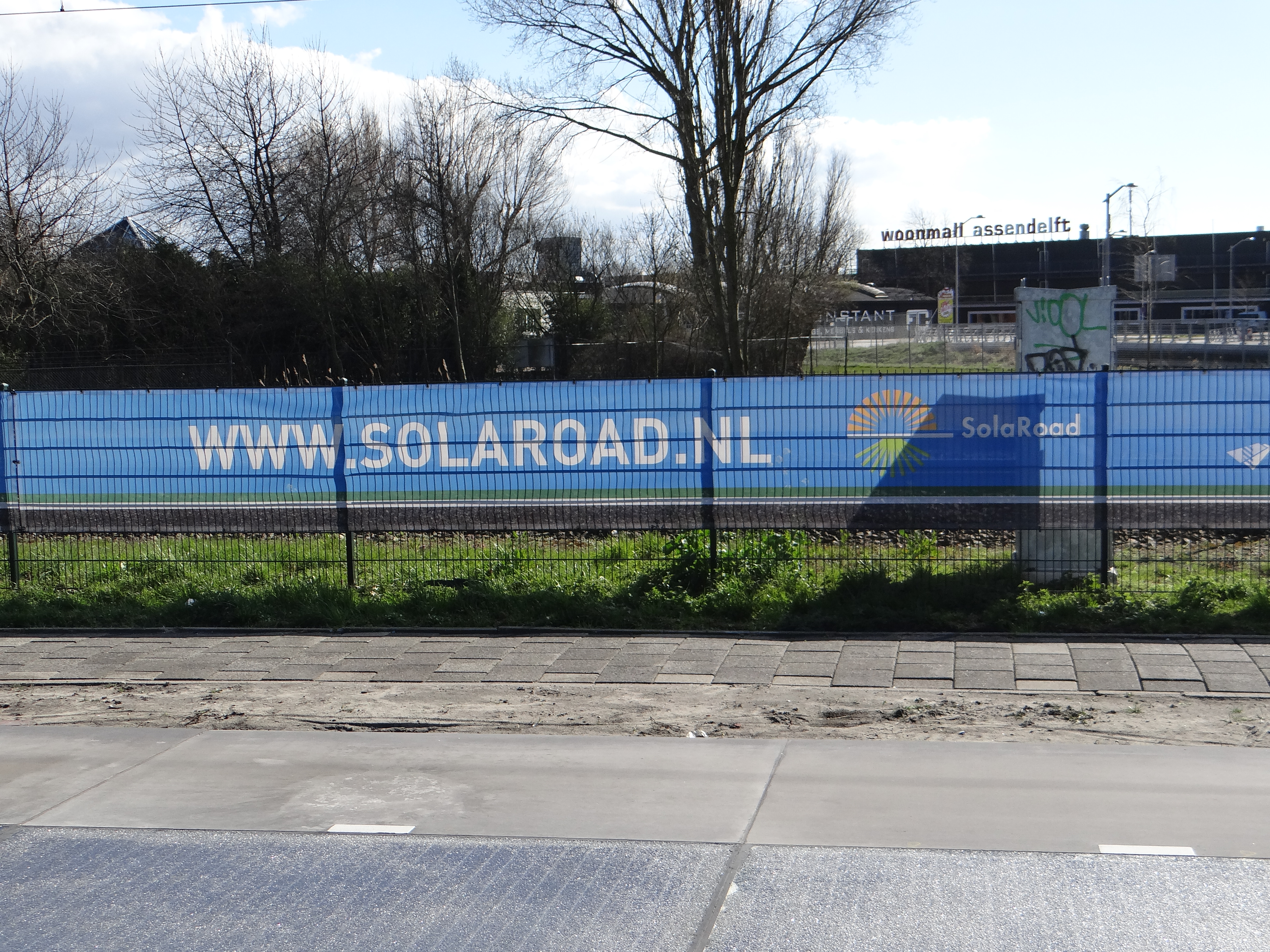 Solaroad7